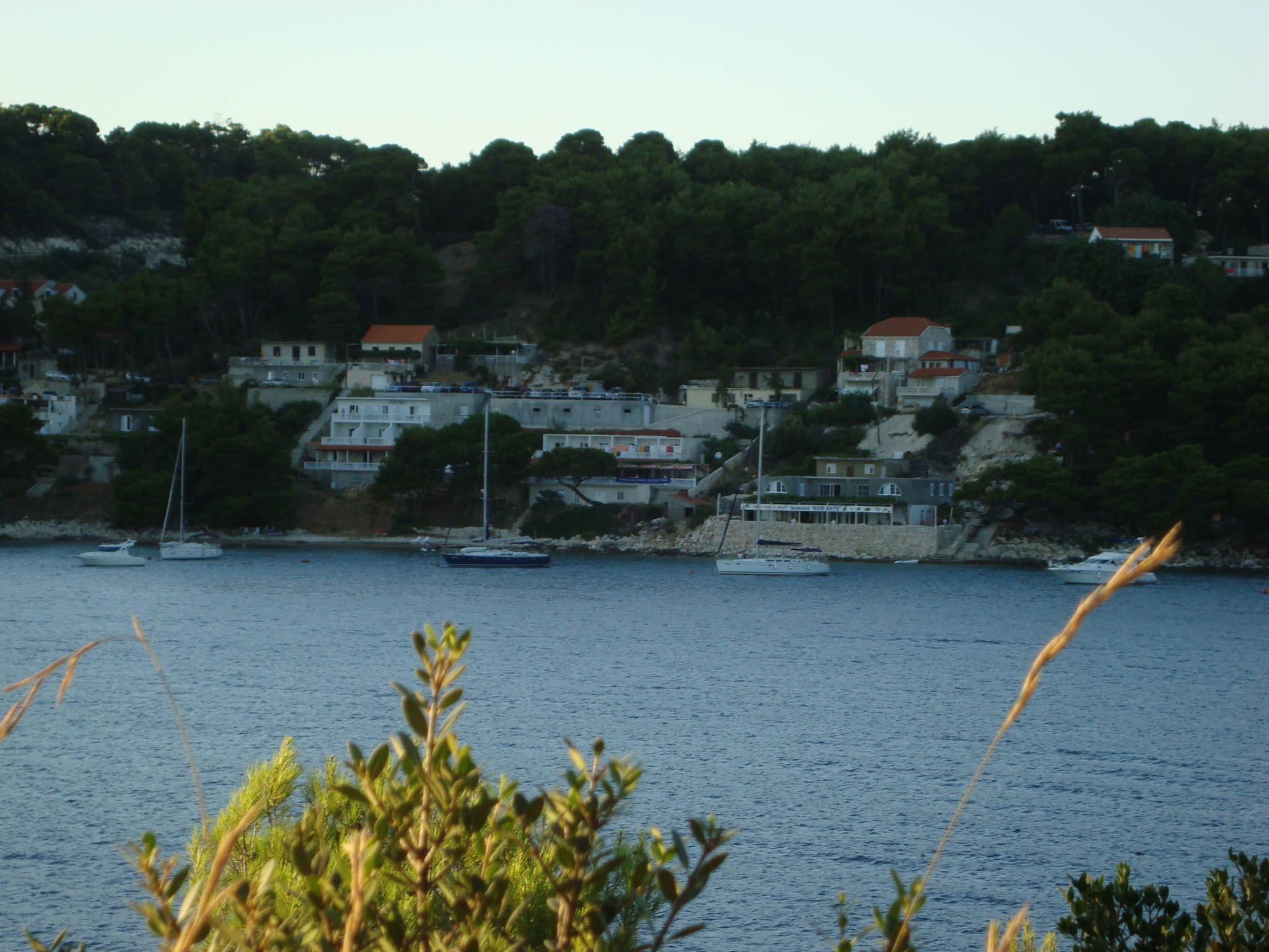 Saplunara, novo turističko naselje na krajnjem istoku otoka Mljeta, Hrvatska